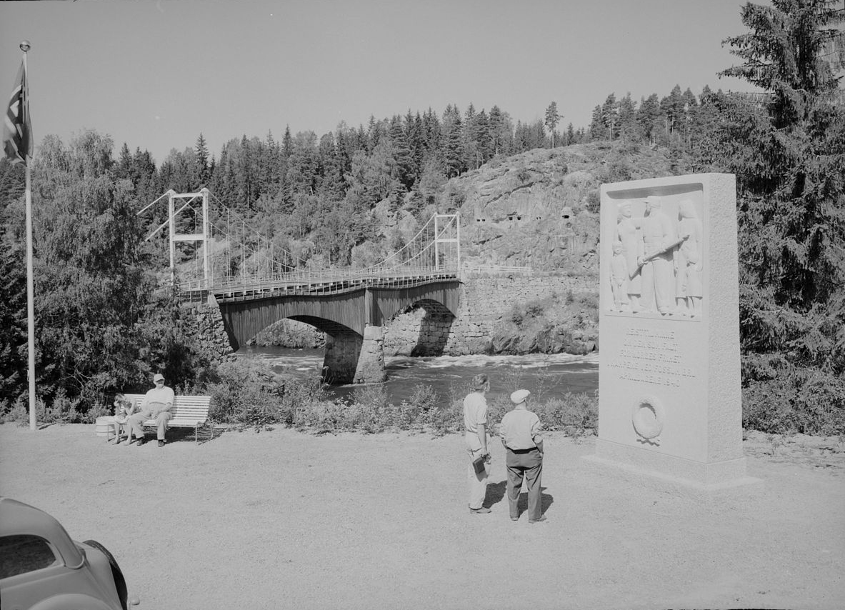 Bildet er hentet fra Nasjonalbibliotekets bildesamling Fossum,Glomma, Askim,Spydeberg, Østfold